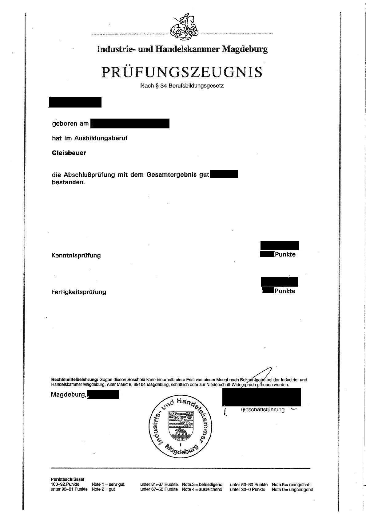 Fachlager/rist Prüfungszeugnis